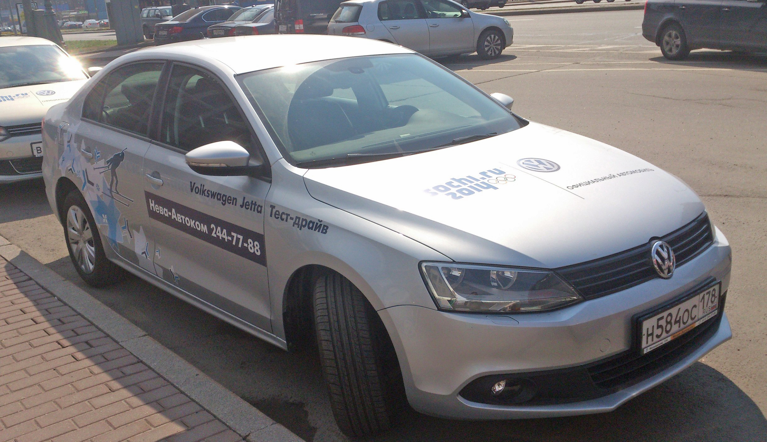 Volkswagen Jetta Sochi 2014 a Saint-Petersbourge Russie